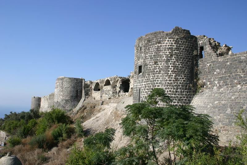 Margat, eigenes Foto von 2004, public domain Mewes 06:45, 26. Feb 2005 (CET) Außenmauer der Vorburg